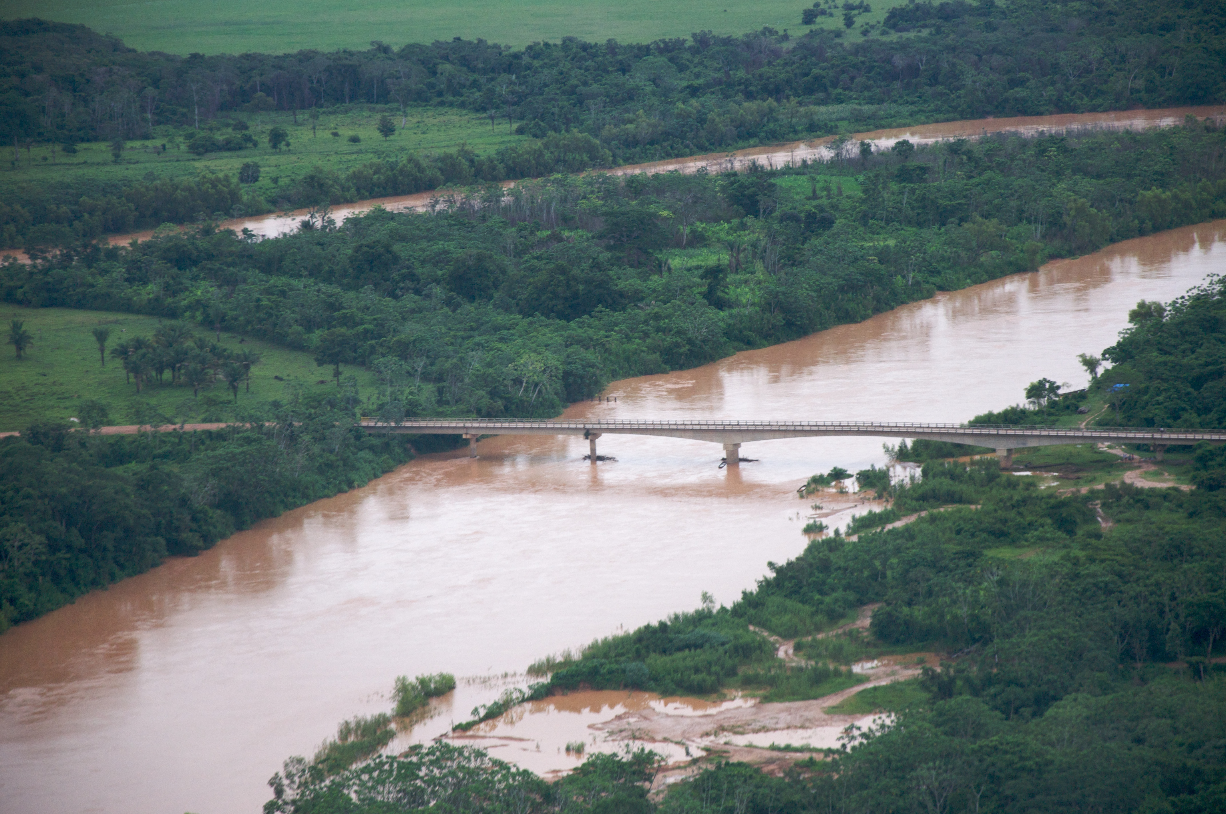 vista del puente que cruza el río Maniqui